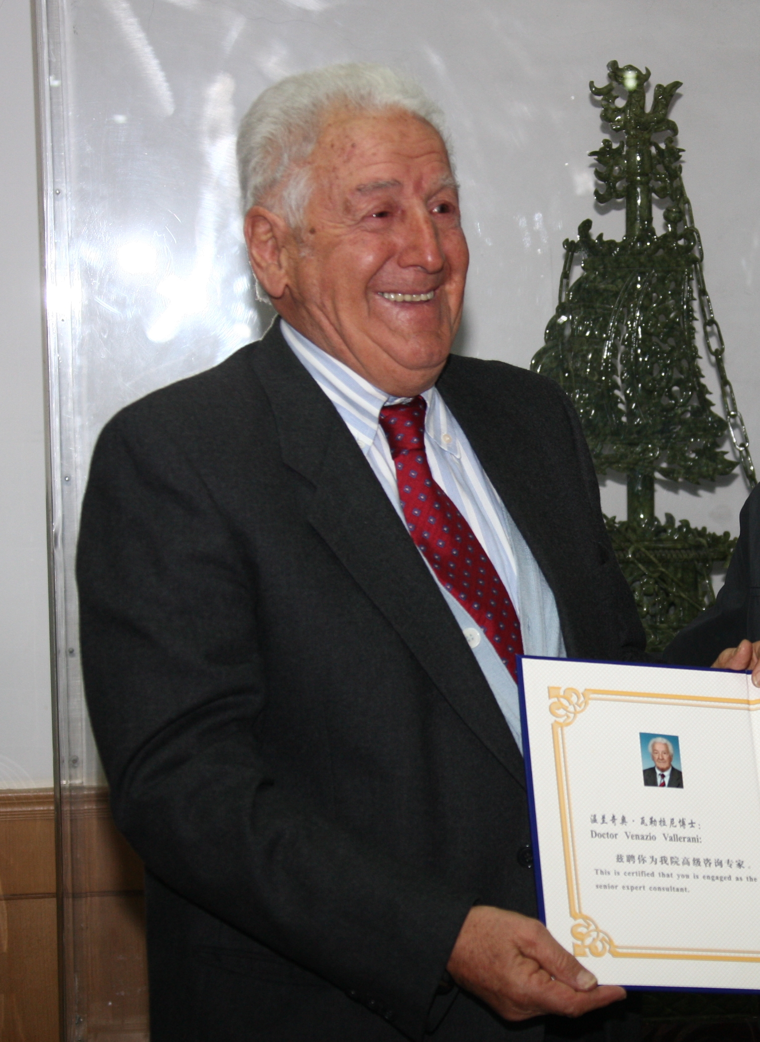 Venanzio Vallerani con il Certificate of Friendschip